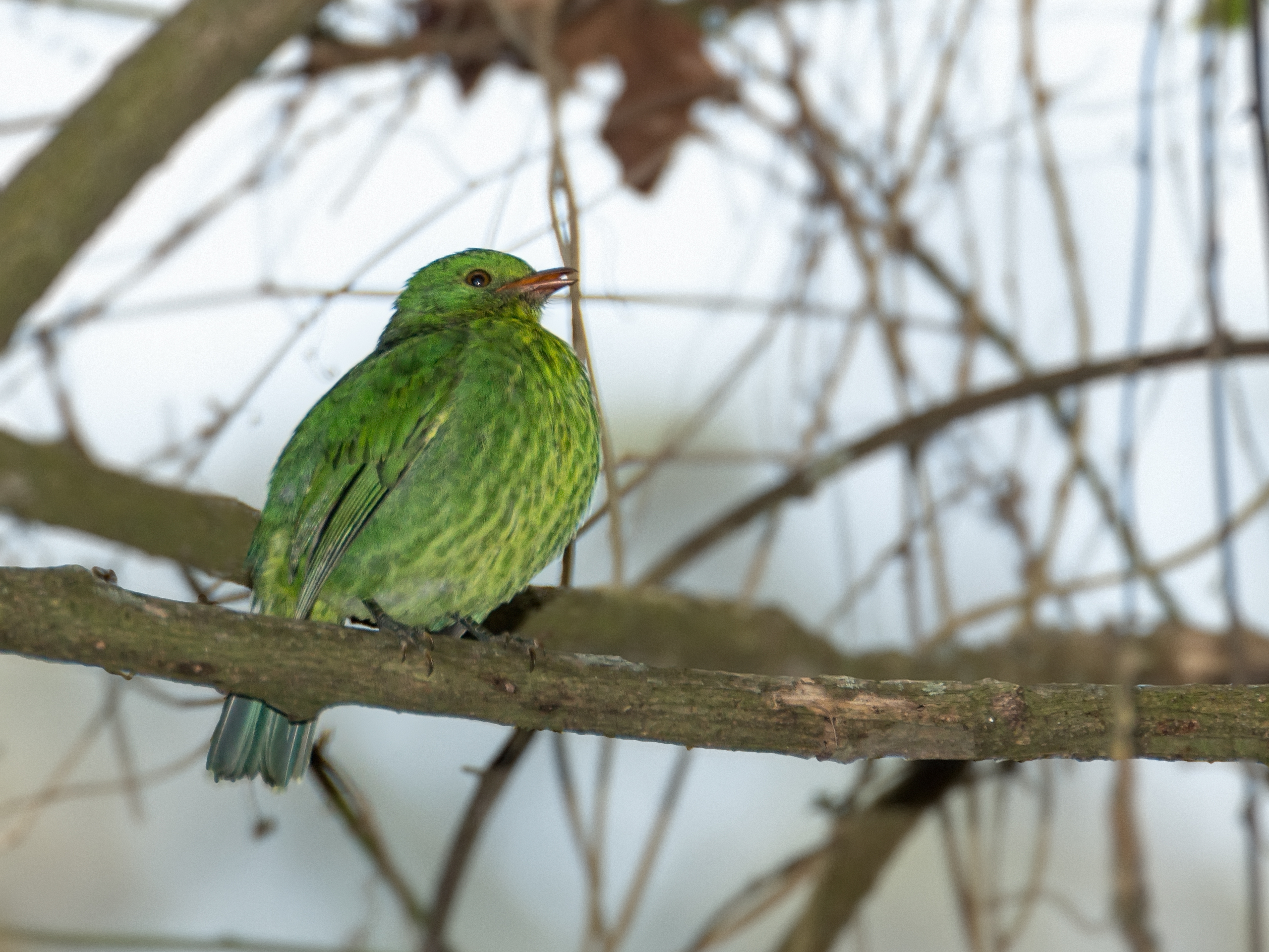 Golden-breasted Fruiteater | Granicera Pechidorada (Pipreola aureopectus festiva)(♀)